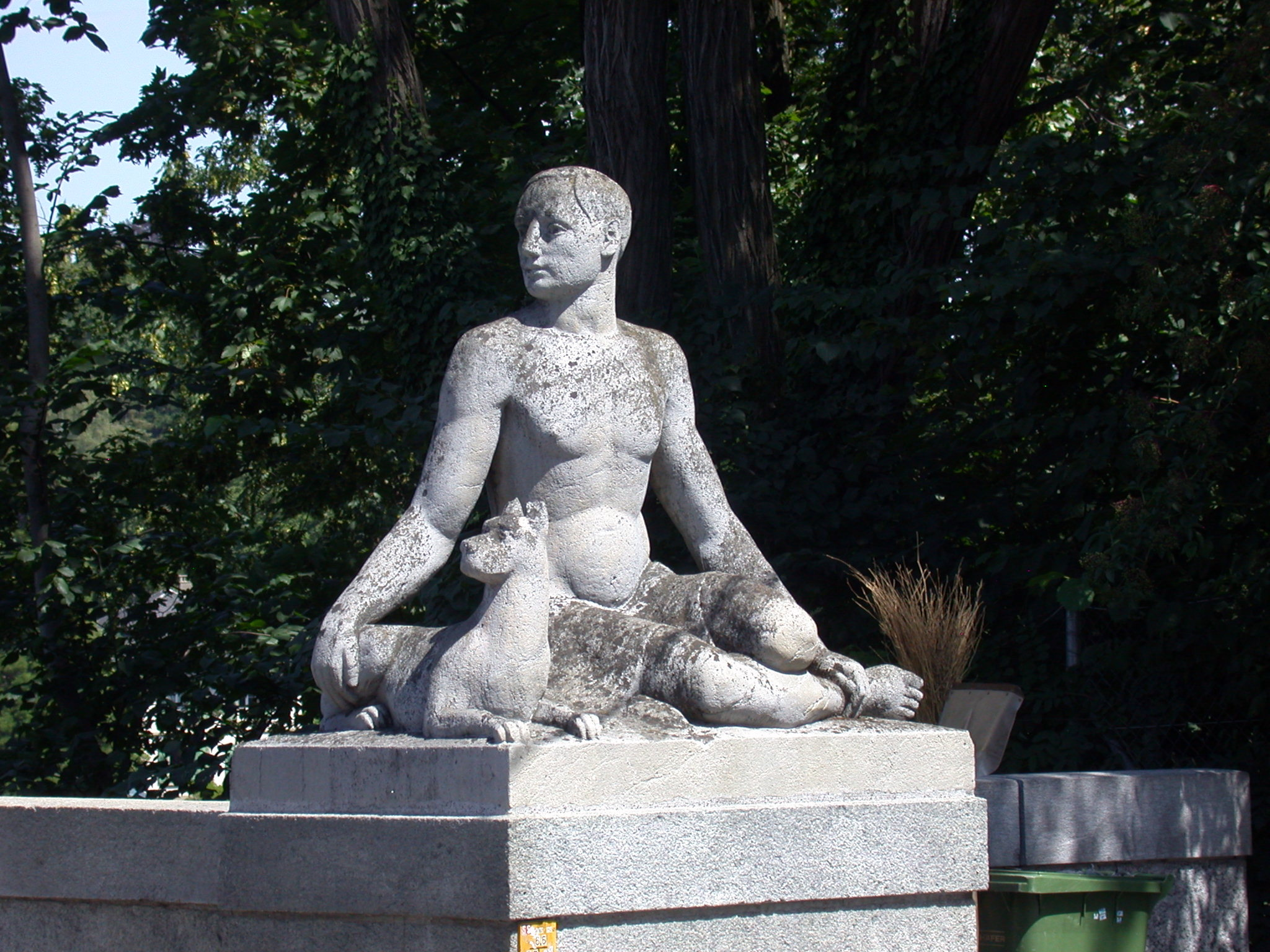 Plastik von Paul Kunz am Südende der Lorrainebrücke.